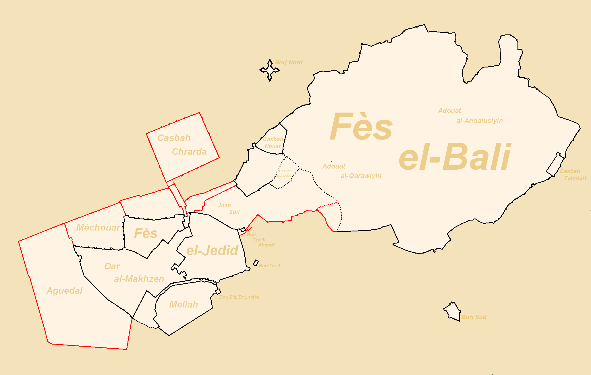 Carte des réalisations alaouites parmi les fortifications de Fès, au Maroc.